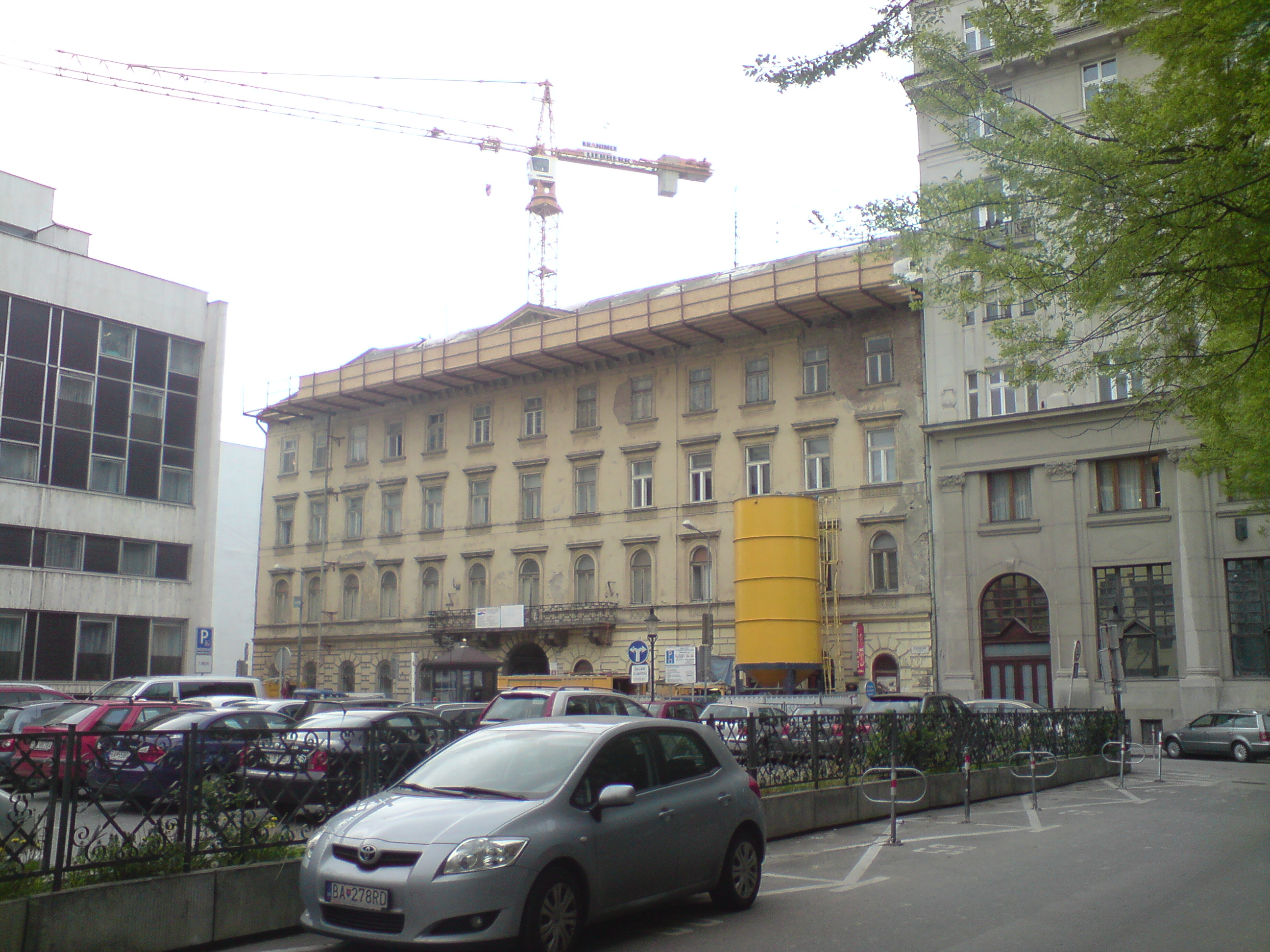 Palác Motešických, Gorkého, Bratislava